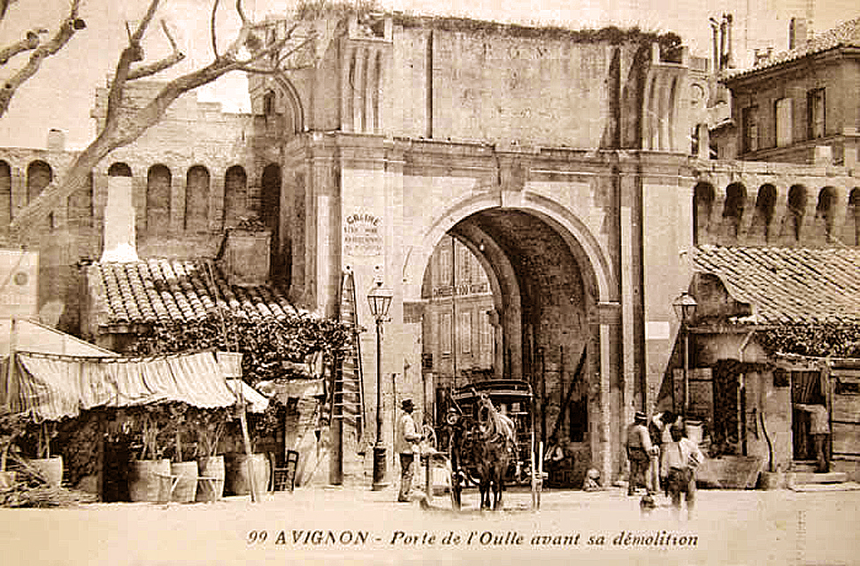 Photographie de la porte de l'Oulle avant 1900, date de sa démolition